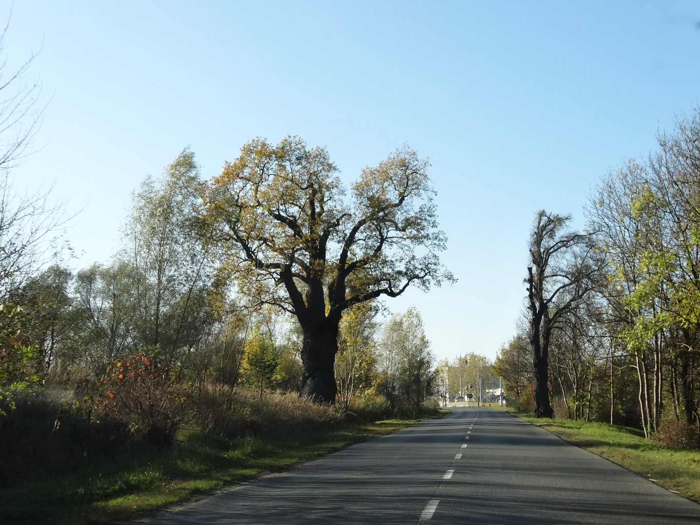 Ulica Toruńska w Bydgoszczy, widoczny 500-letni dąb "Bartek" pomnik przyrody